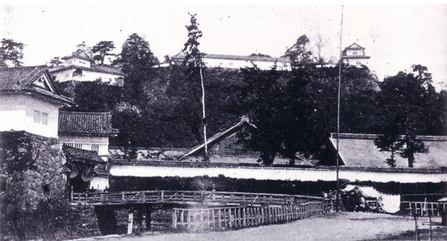 Hikone Castle omote-mon Gate.